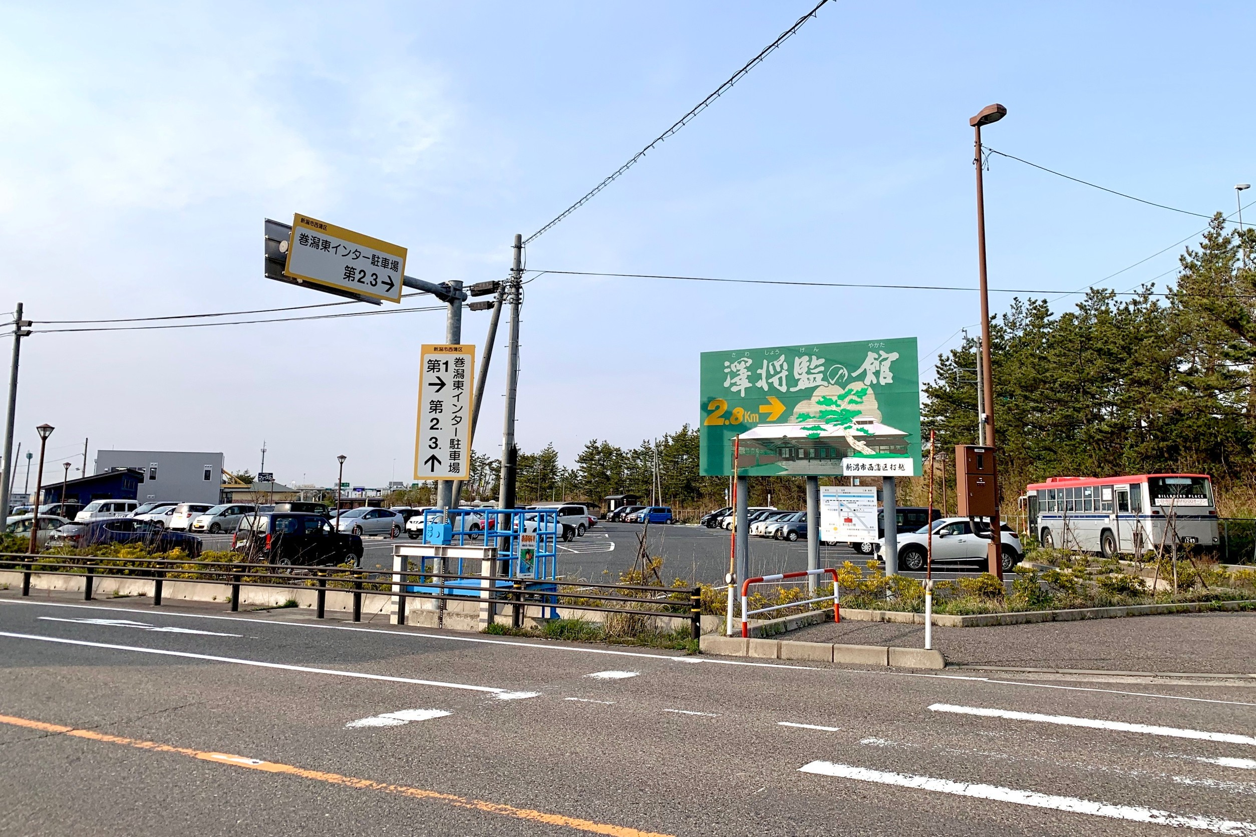 巻潟東インターチェンジ駐車場（新潟市西蒲区，2020年4月）